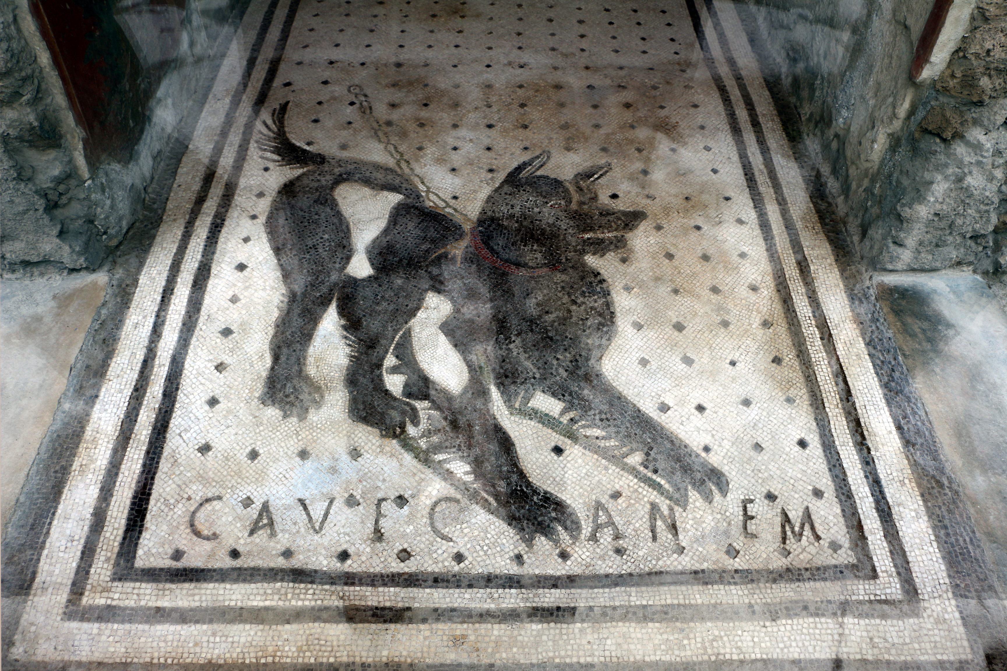 Casa del Poeta Tragico This is a photo of a monument which is part of cultural heritage of Italy.